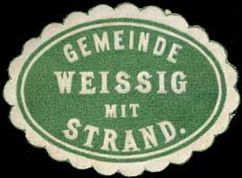 Sealing stamp Title: Gemeinde Weissig mit Strand Description: grün, weiß, geprägt Place: Weissig / Strand size: 3x4 cm